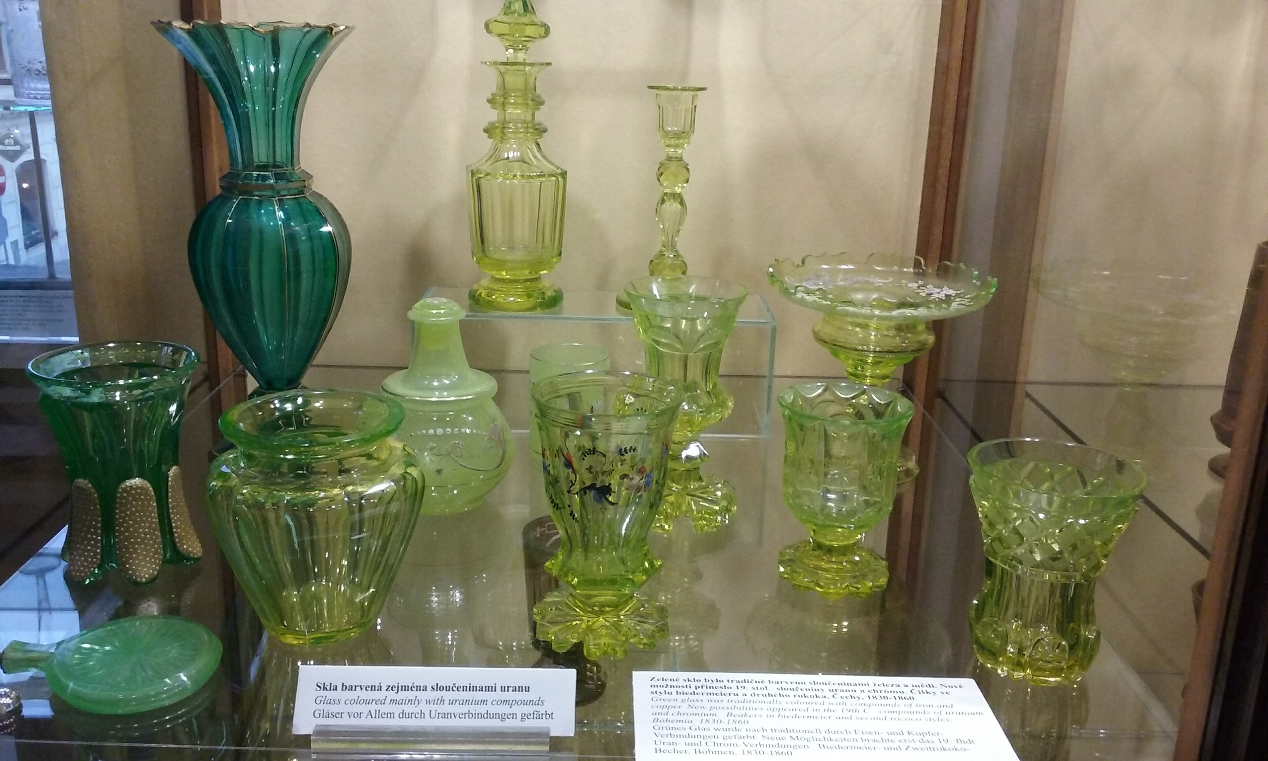 Historické sklo v muzeu v Sušici. Okres Klatovy, Česká republika.